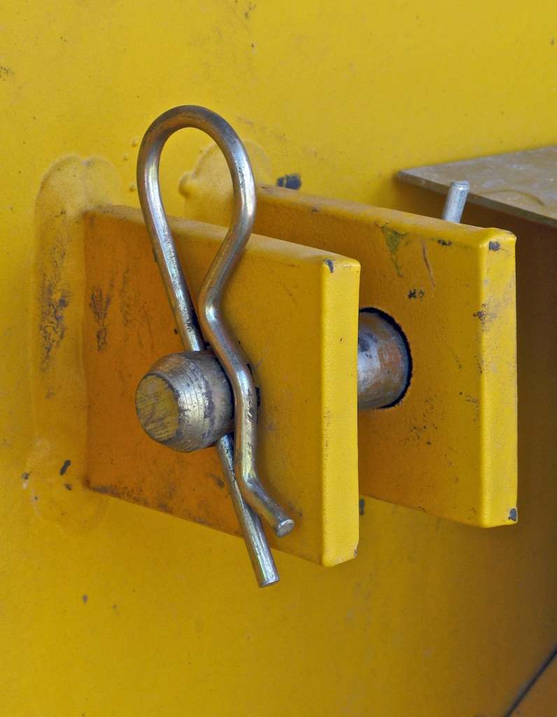 E Fiedersplënt.